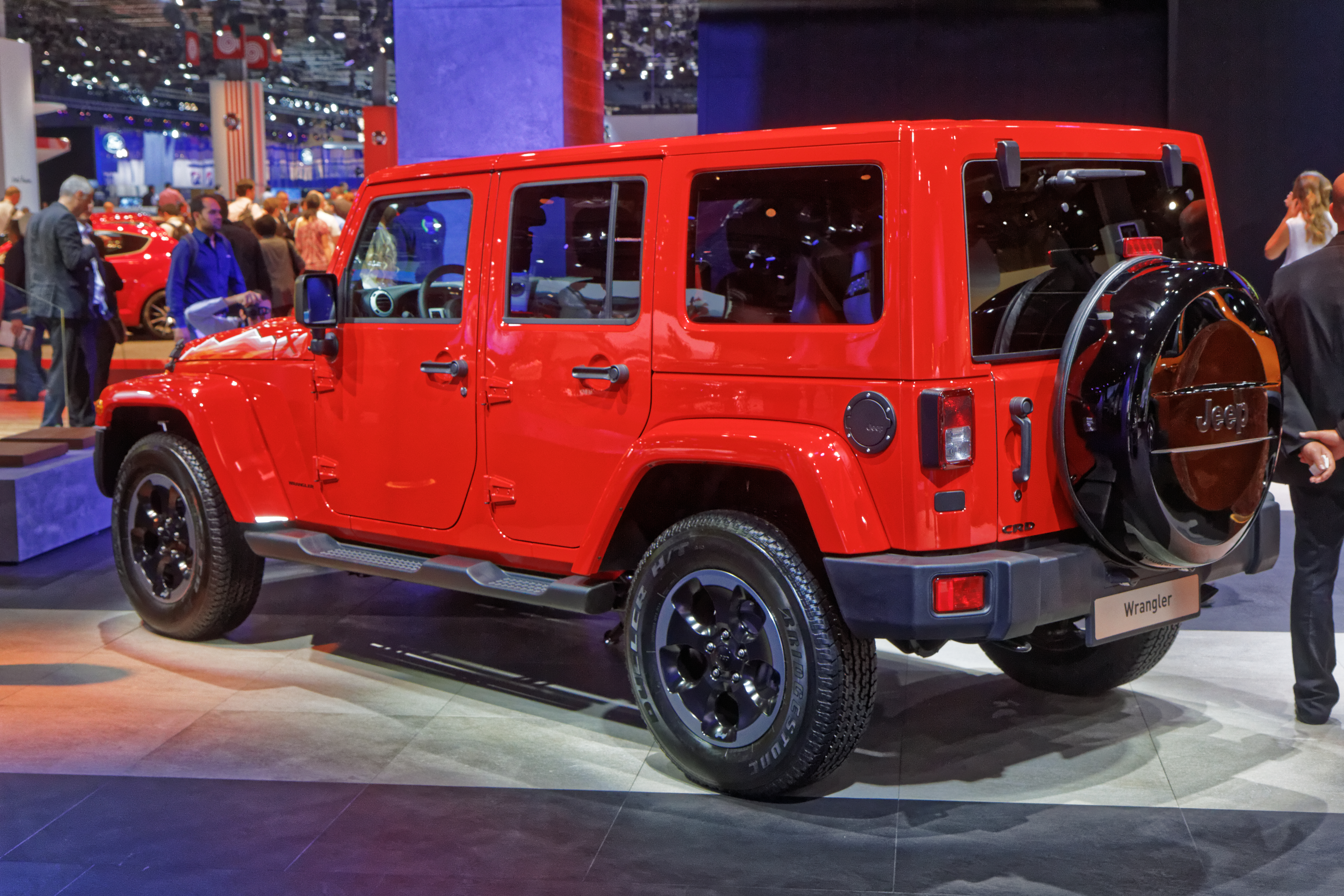 Une Jeep Wrangler présentée lors du mondial de l'automobile de Paris 2014.